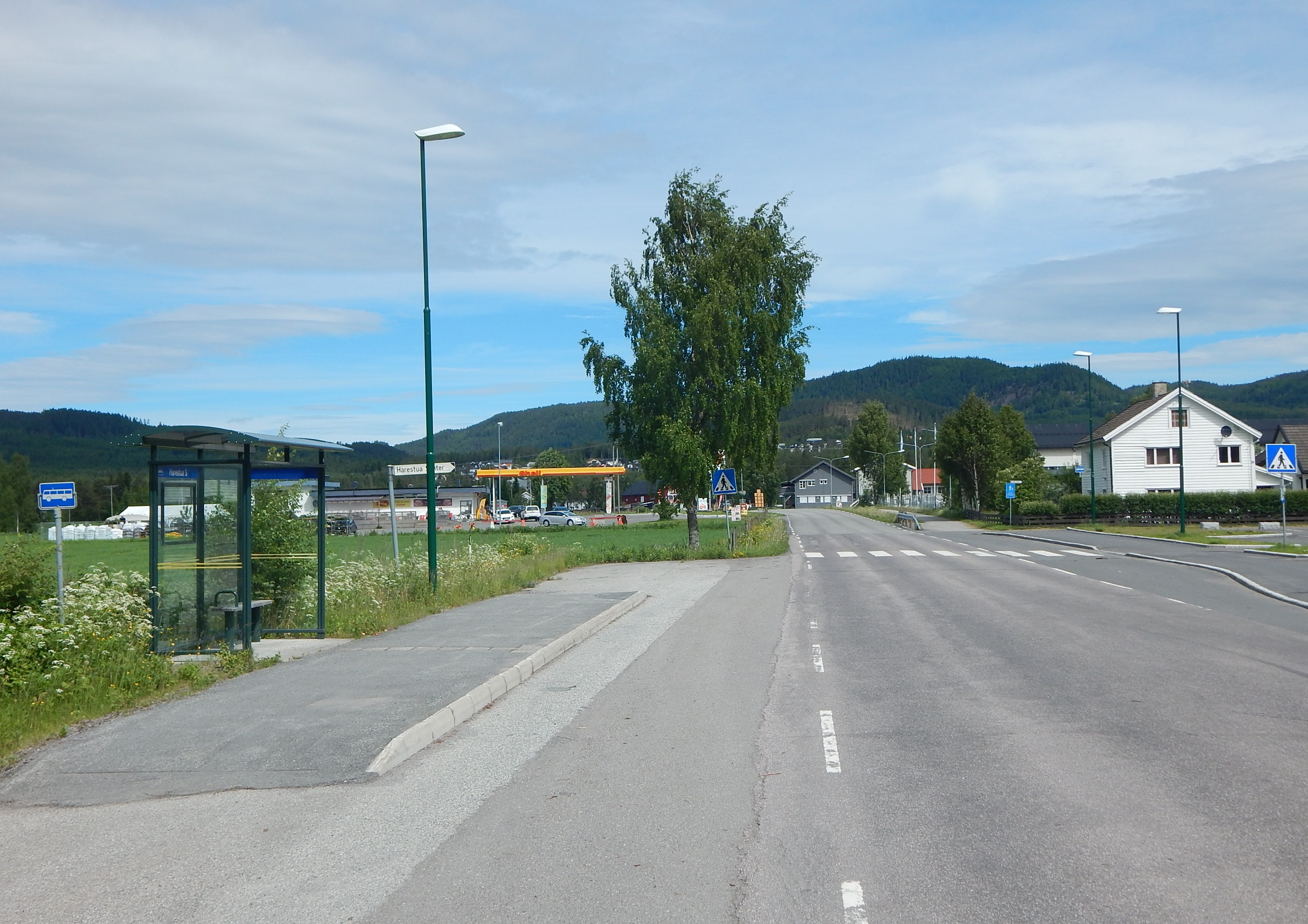 Fylkesvei 2300 (tidl. FV16) gjennom Harestua